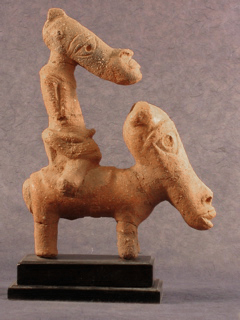 Amer Ghandour Image:IMG 3969 (118).jpg